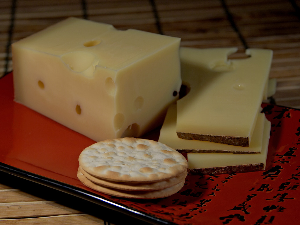 Emmentaler Cheese